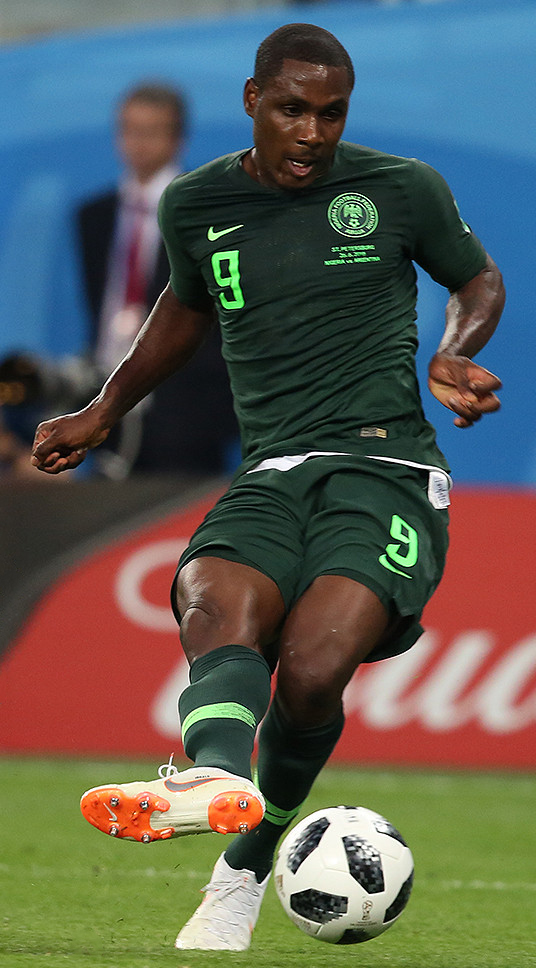 Гол Рохо в концовке выводит Аргентину в плей-офф чемпионата мира